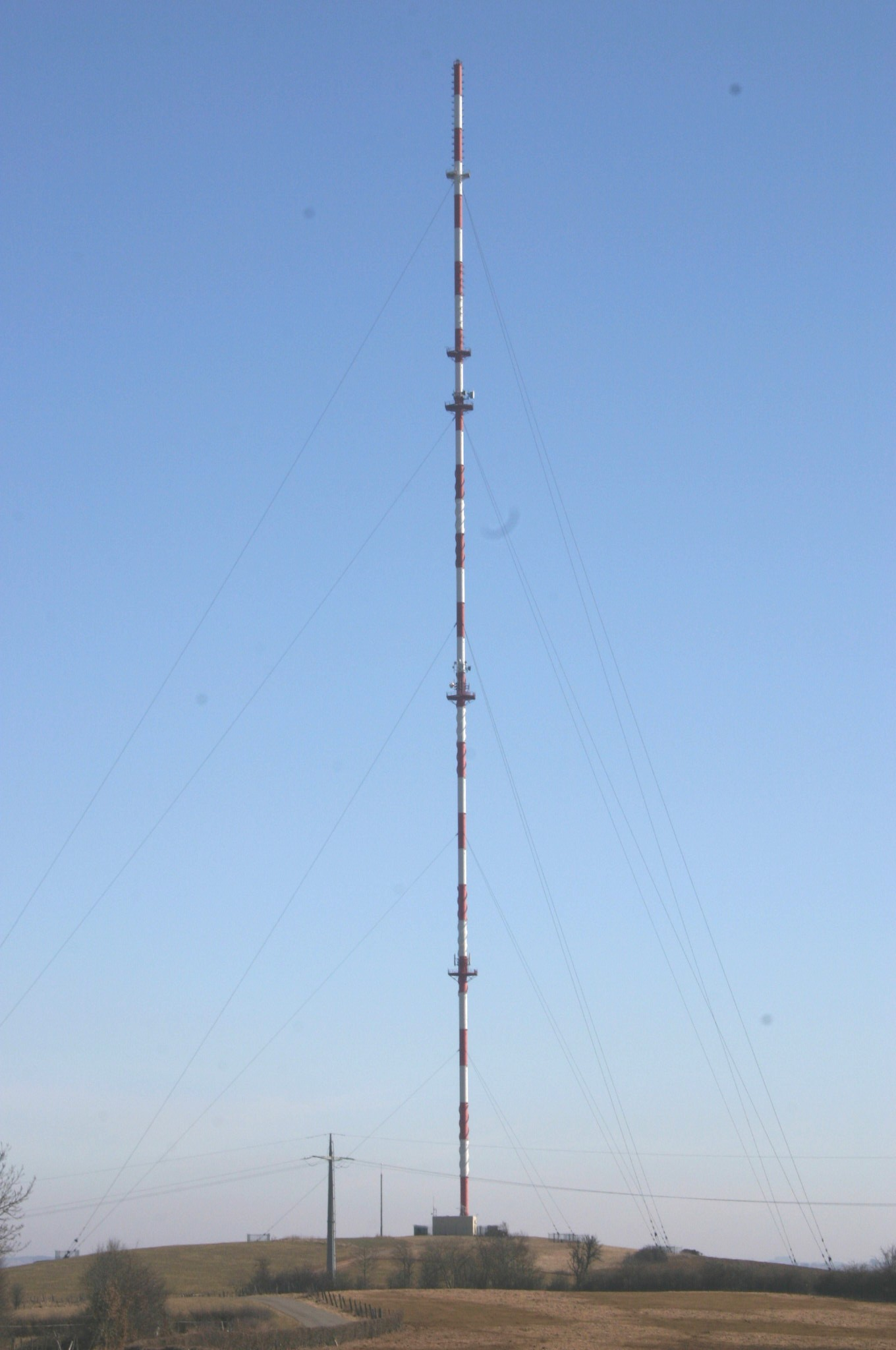 De Sender vun Housen.